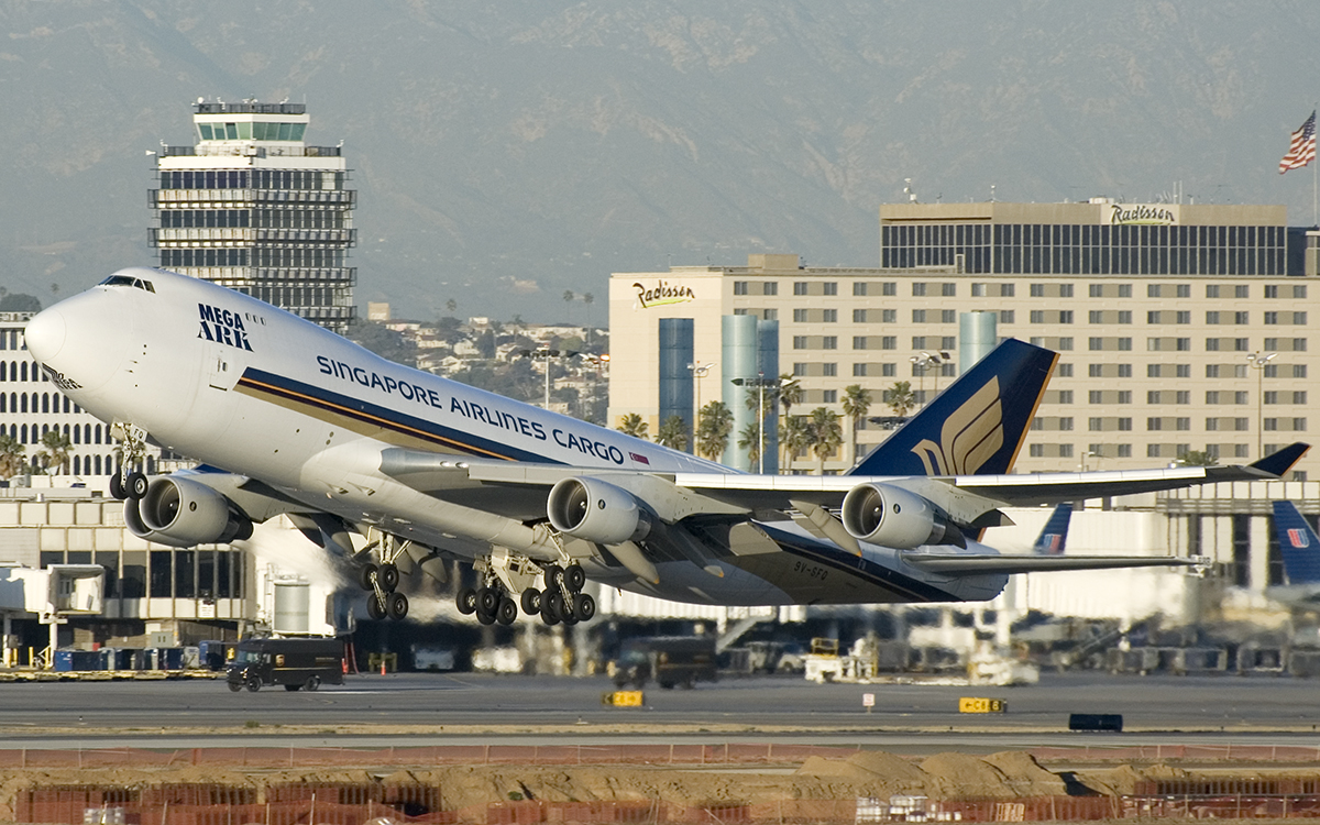 departing LAX